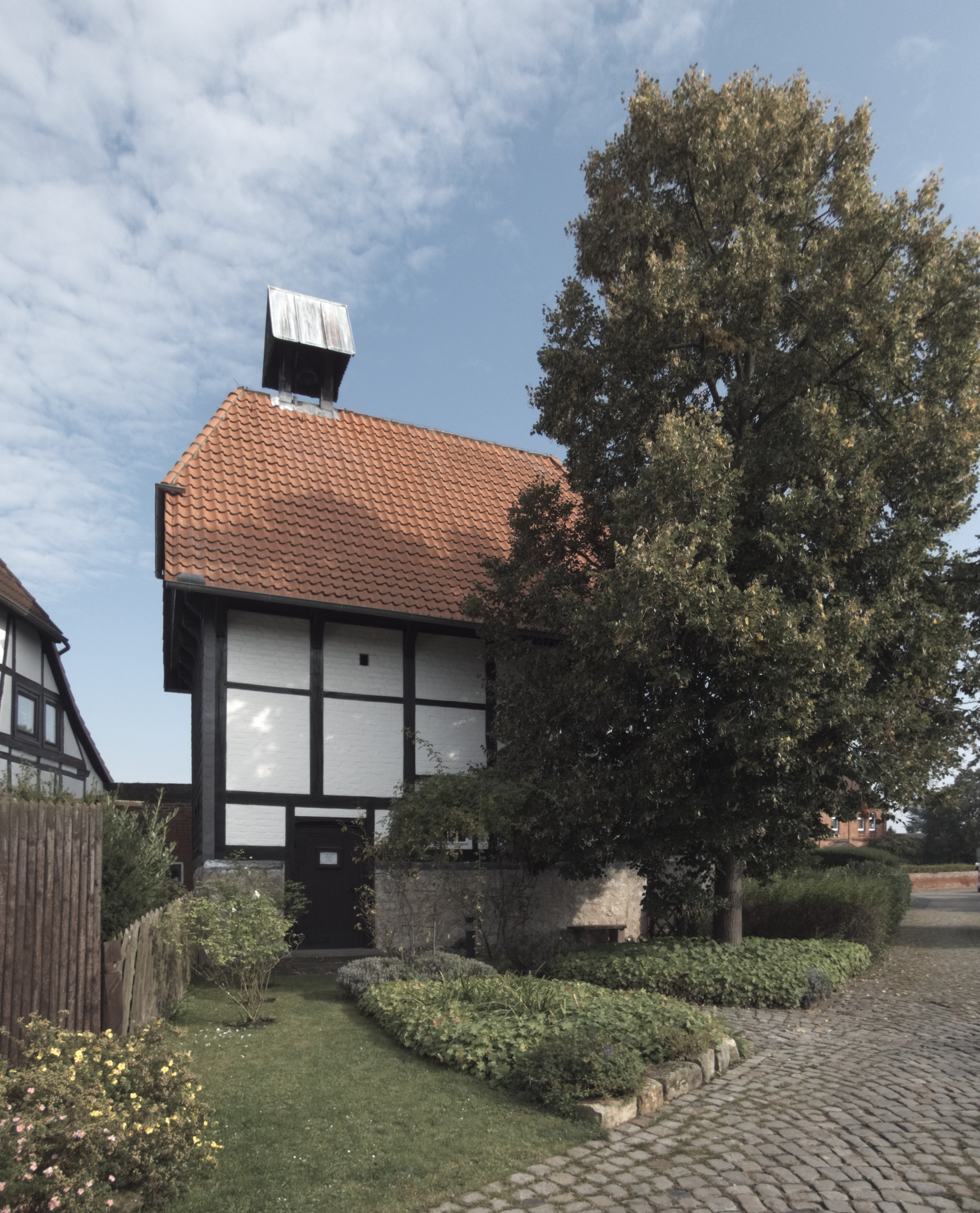 Die Fachwerkkapelle mit Dachreiter im Hemminger Stadtteil Devese